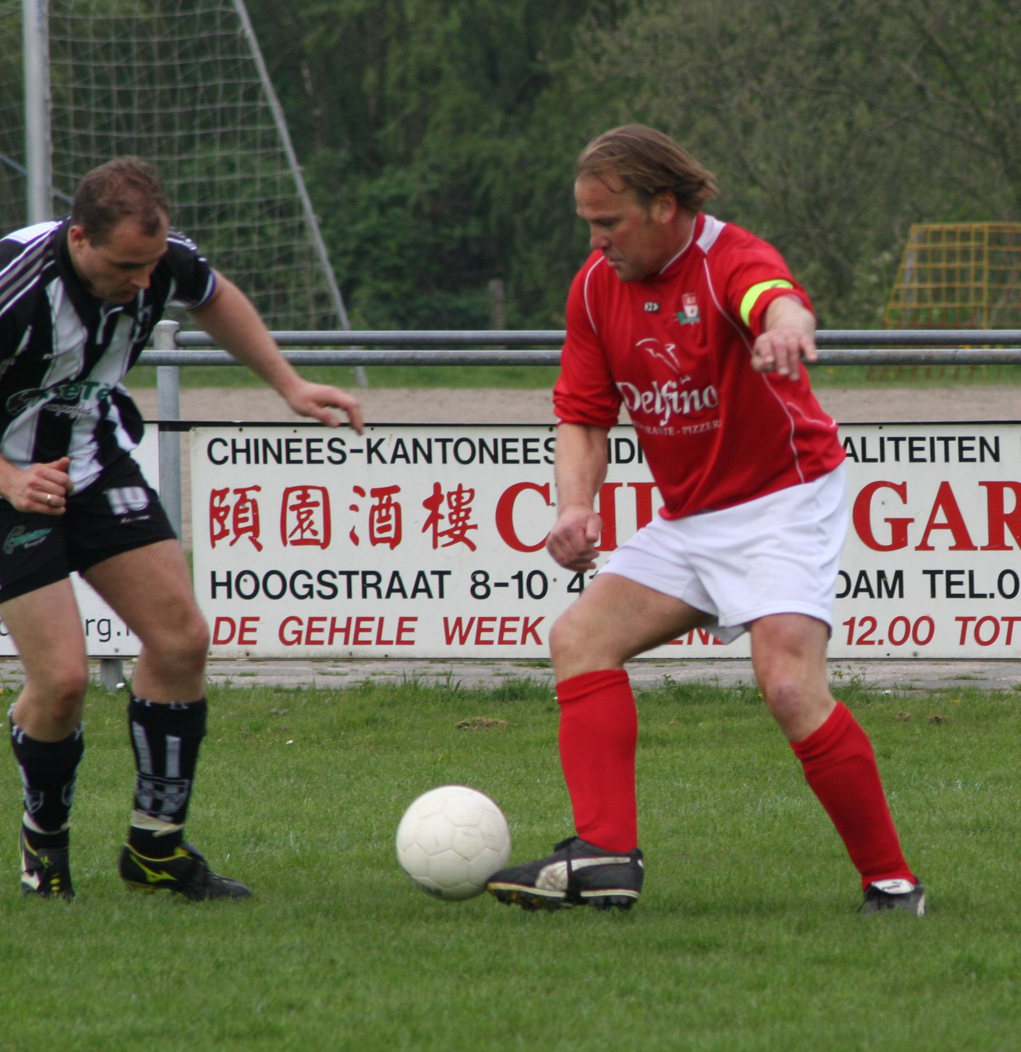 Arie Romijn (Gorkum, 4 december 1958) is een voormalig Nederlands profvoetballer die achtereenvolgens speelde voor FC Groningen, Feyenoord, FC Den Bosch, Vitesse en RBC